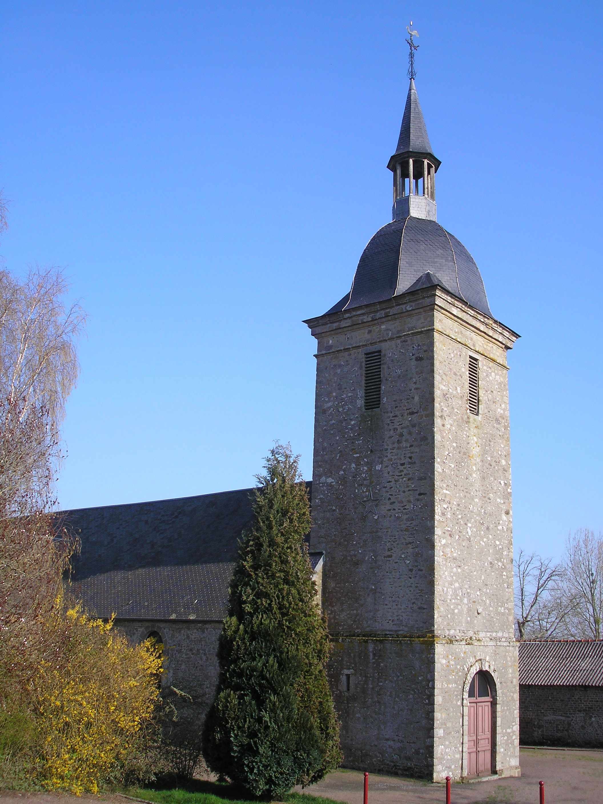 Proussy (Normandie, France). L'église Notre-Dame.